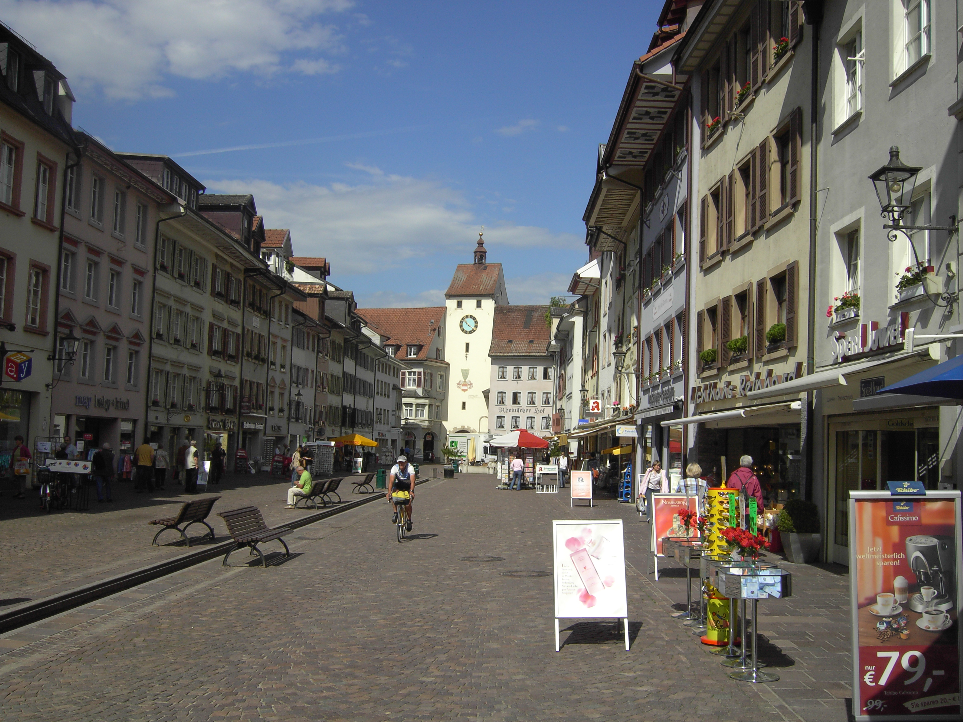 Altstadt von Waldshut, Waldshut-Tiengen, Deutschland